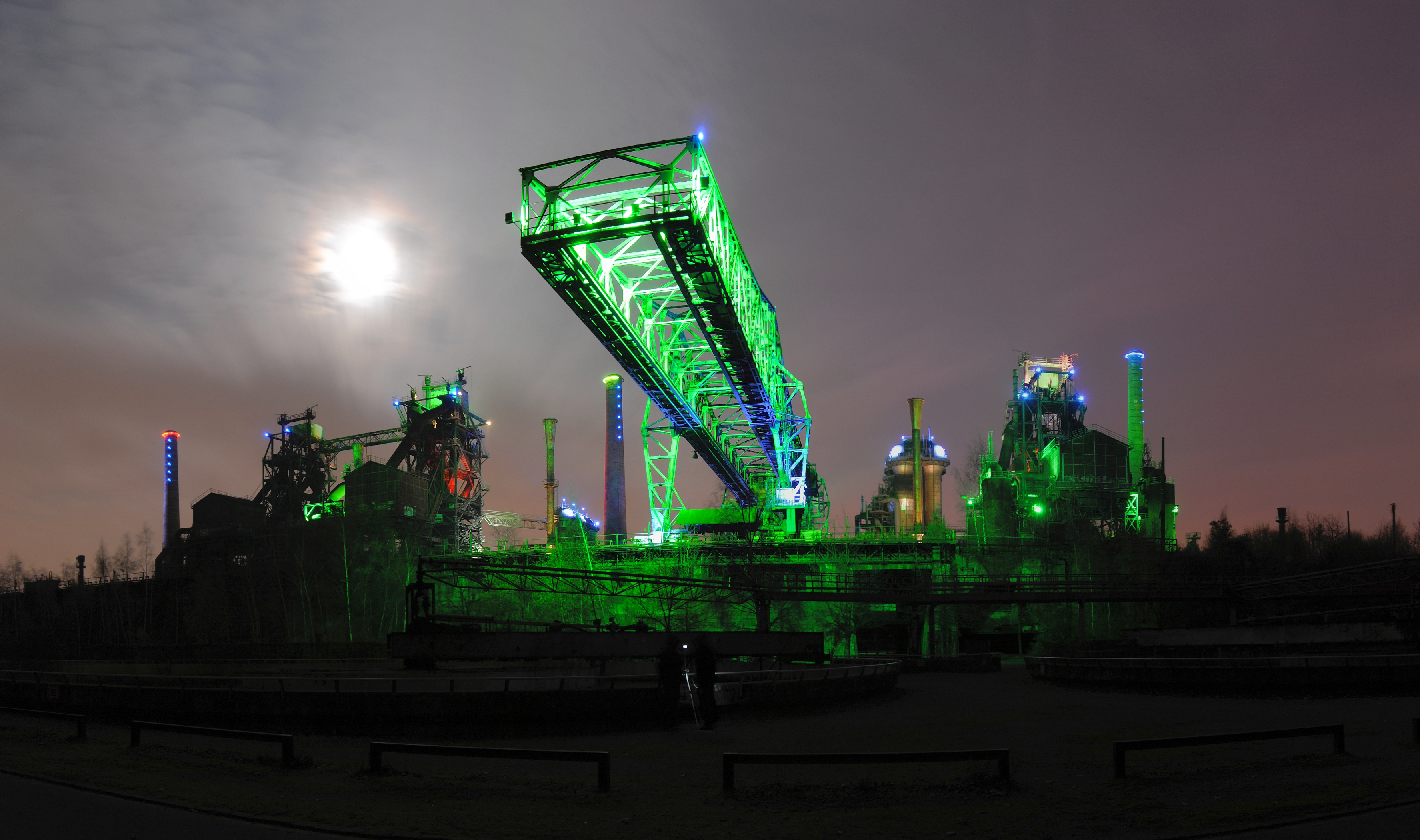 Übersichts-Panorama der wichtigsten Elemente des Landschaftsparks Duisburg-Nord von Westen aus gesehen mit Beleuchtung bei Nacht. This image was created with Hugin.